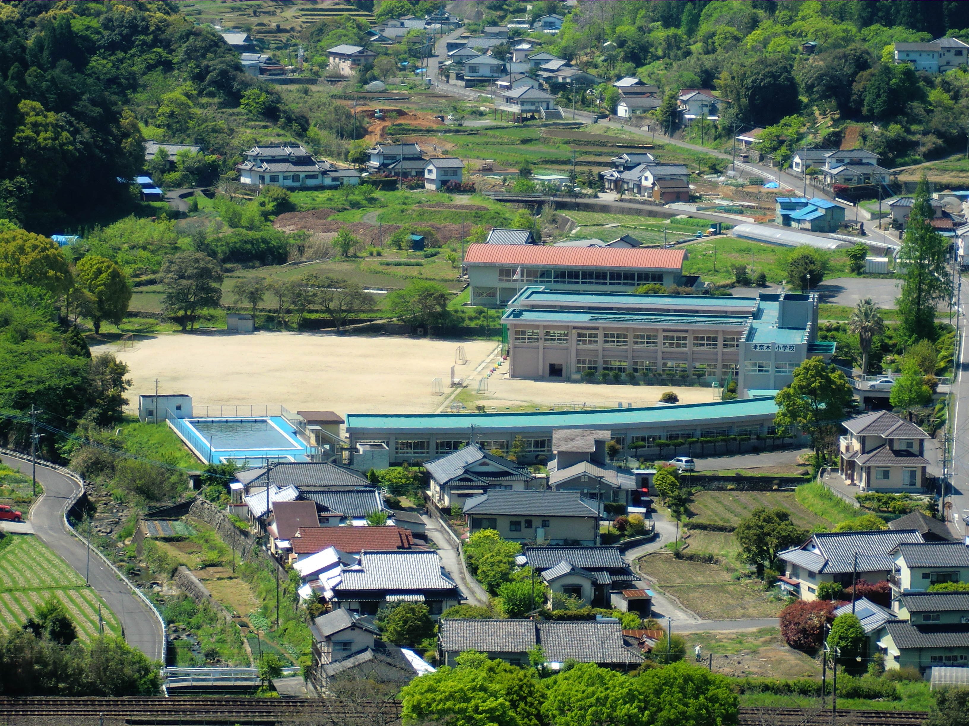 熊本県葦北郡津奈木町にある津奈木小学校を舞鶴城公園から撮影